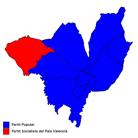 Partits polítics més votats als municipis de l'Alt Maestrat (País Valencià) després de les eleccions municipals de 2007.